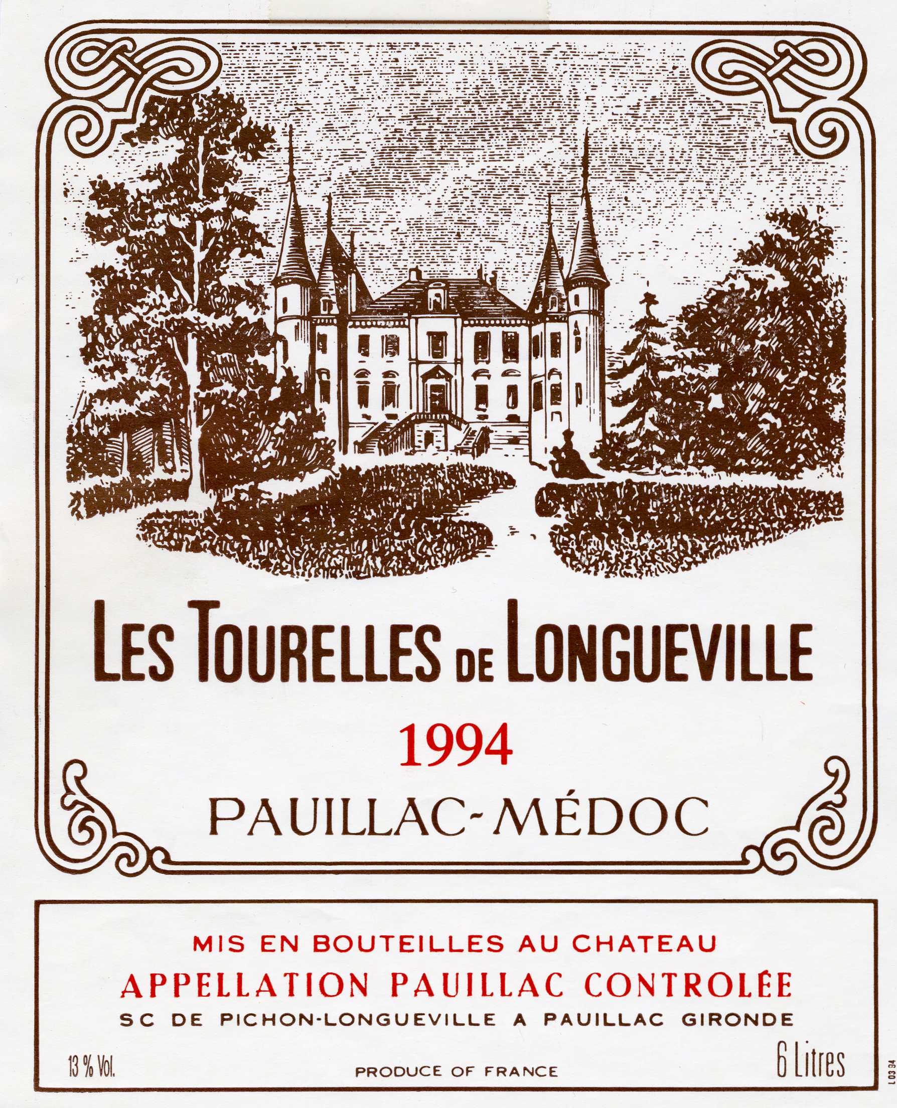 Etiqu. Tourelles de Longueville 1994.jpg